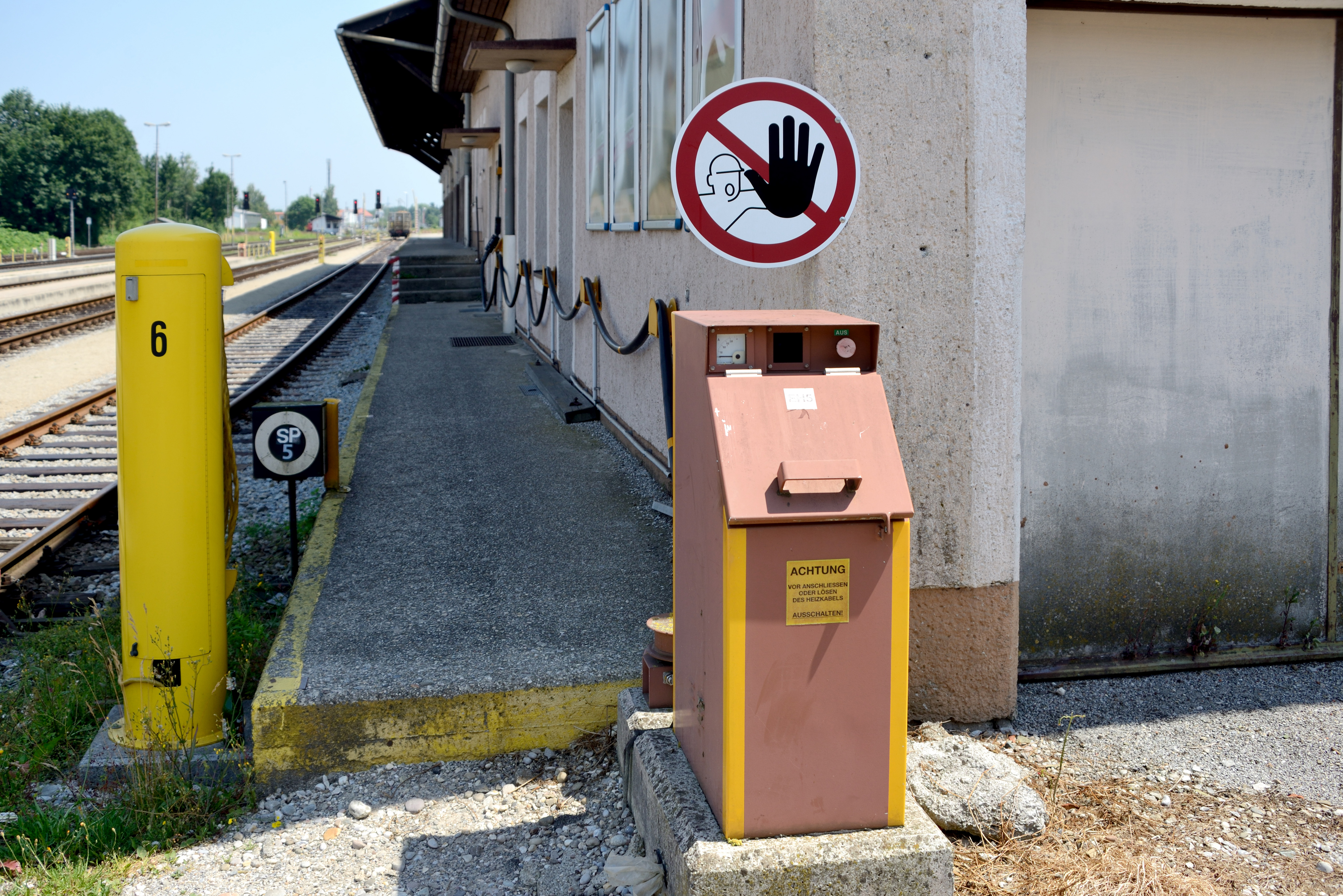 Vorheizanlage (Einfachheizständer) am Bahnhof Braunau am Inn